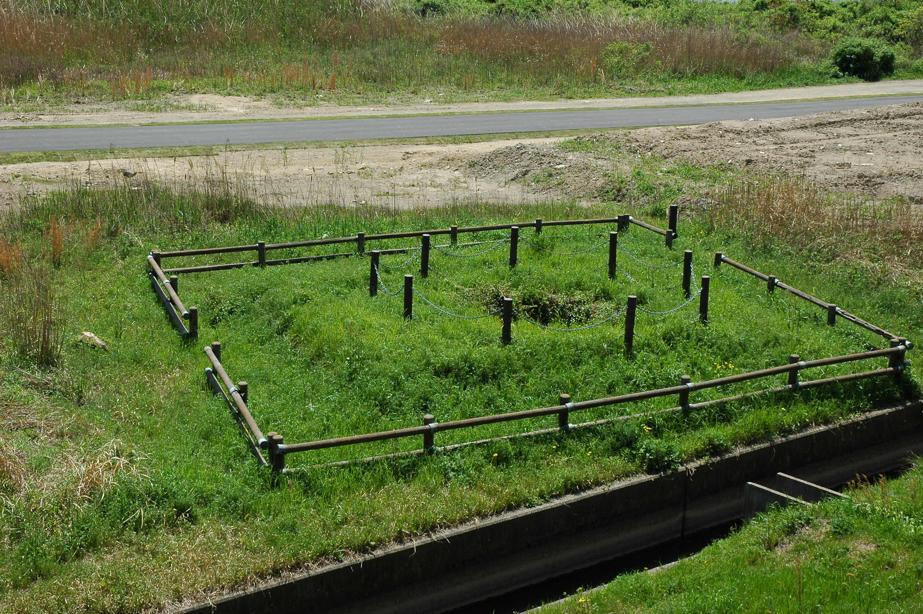 Kōgai well in Hyakken River(Hyakkengawa) in Okayama city